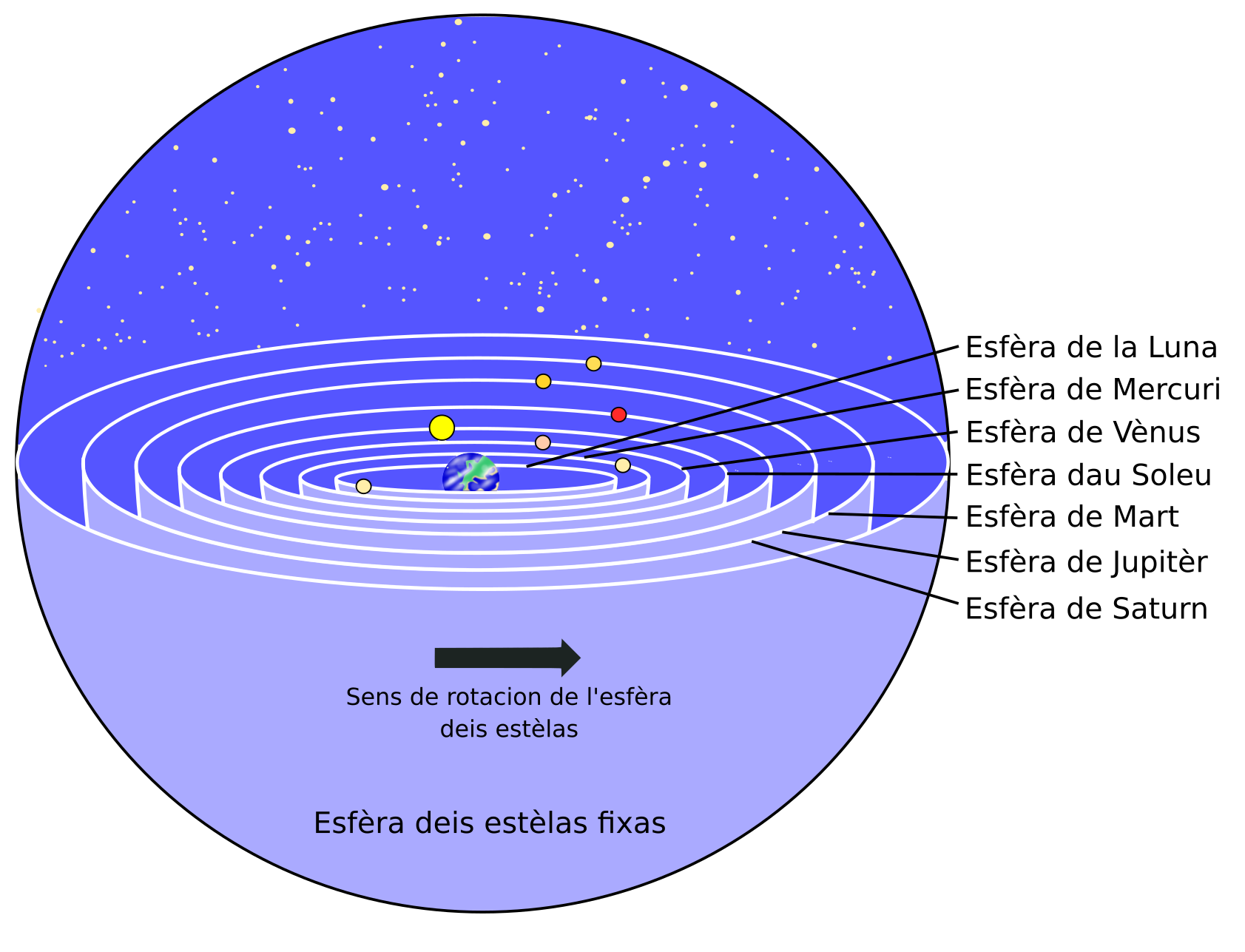 Representacion de la cosmologie d'Aristòtel.